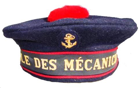 Bachi